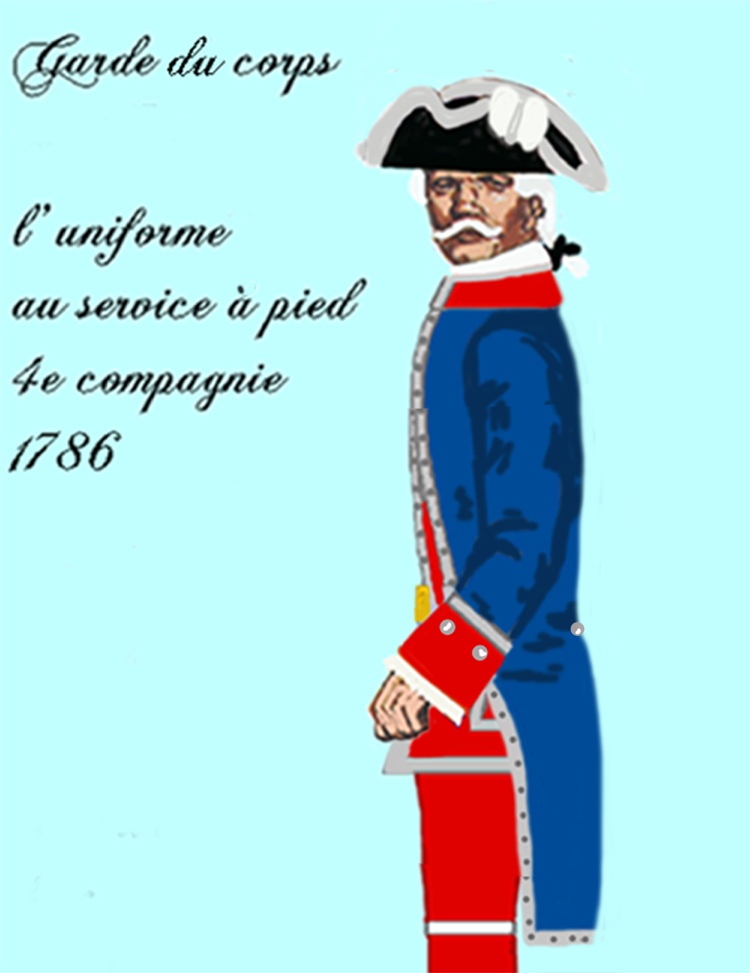 Uniform für den Dienst zu Fuß eines Angehörigen der 4. Kompanie der kgl. französischen Garde du corps